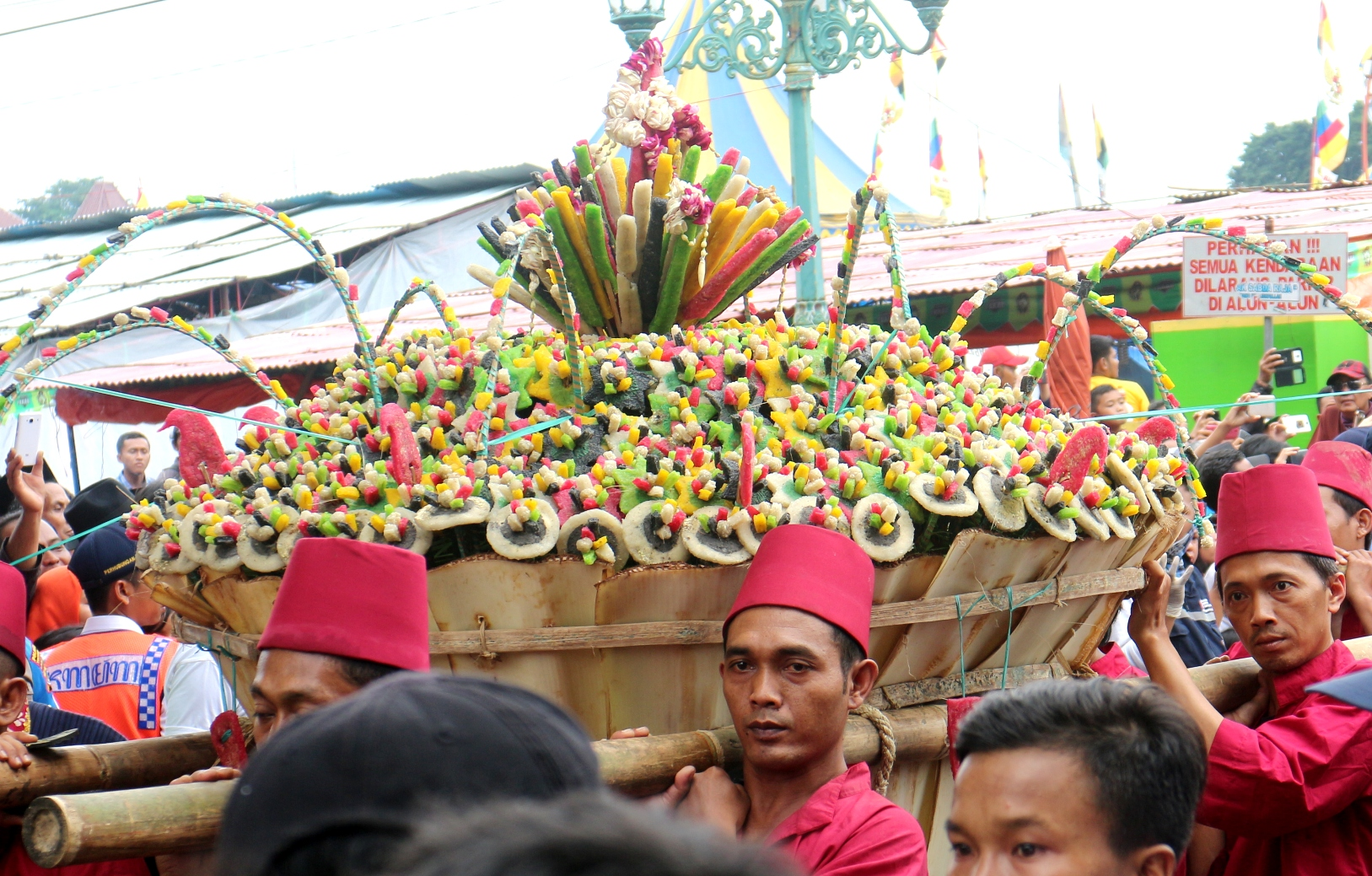 Gunungan darat, berisi kue ketan, untuk diperebutkan masyarakat pada garebeg Mulud tahun Dal (1 Desember 2017) di halaman Masjid Ageng Karaton Yogyakarta Hadiningrat